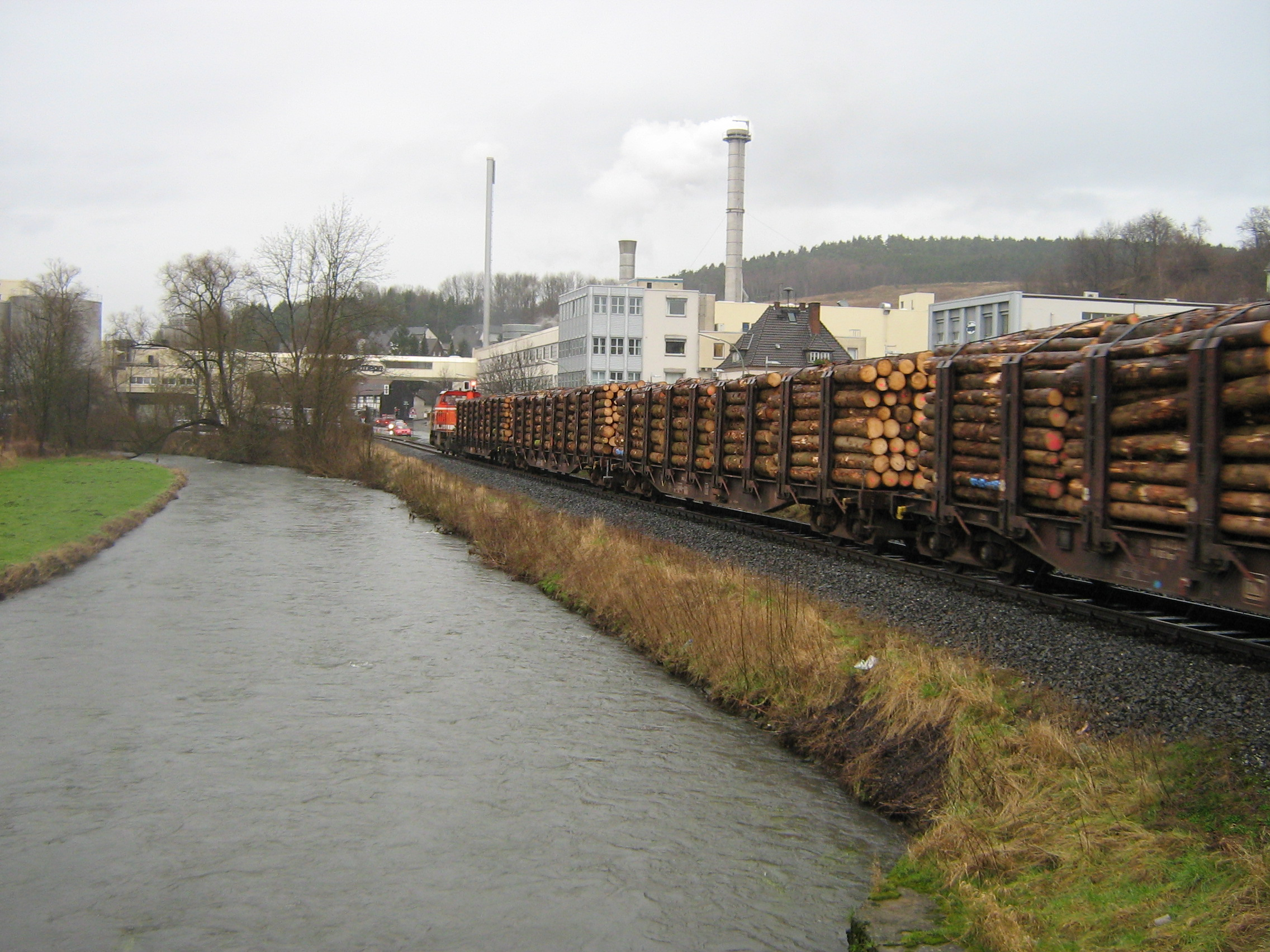 Holztransport mit Sturmholz vom Orkan Kyrill der Röhrtalbahn (RTB) in Müschede bei Firma Wepa